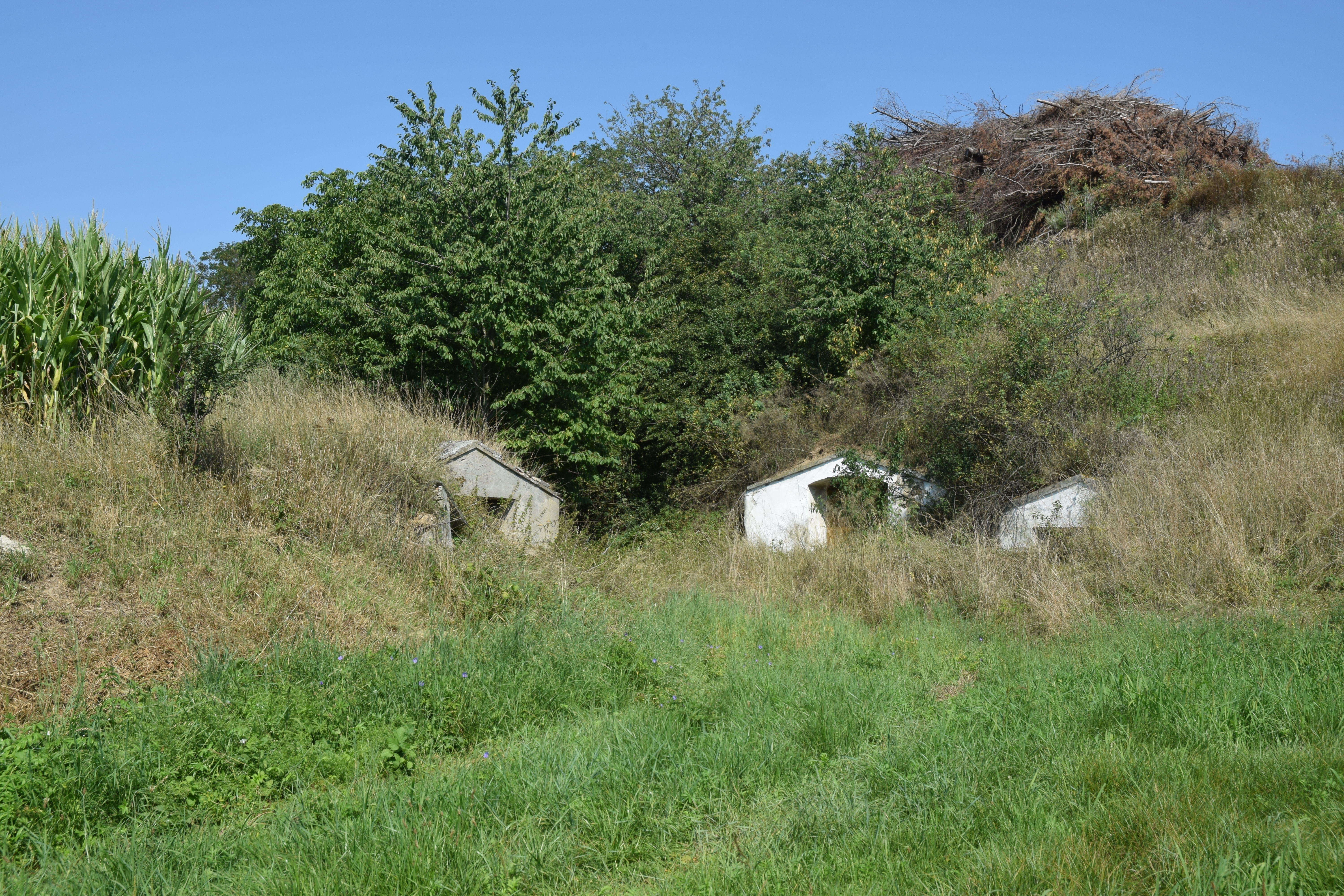 Kellergasse Richtung Roggenbauerkreuz in der KG Pleißing in Hardegg (Niederösterreich)